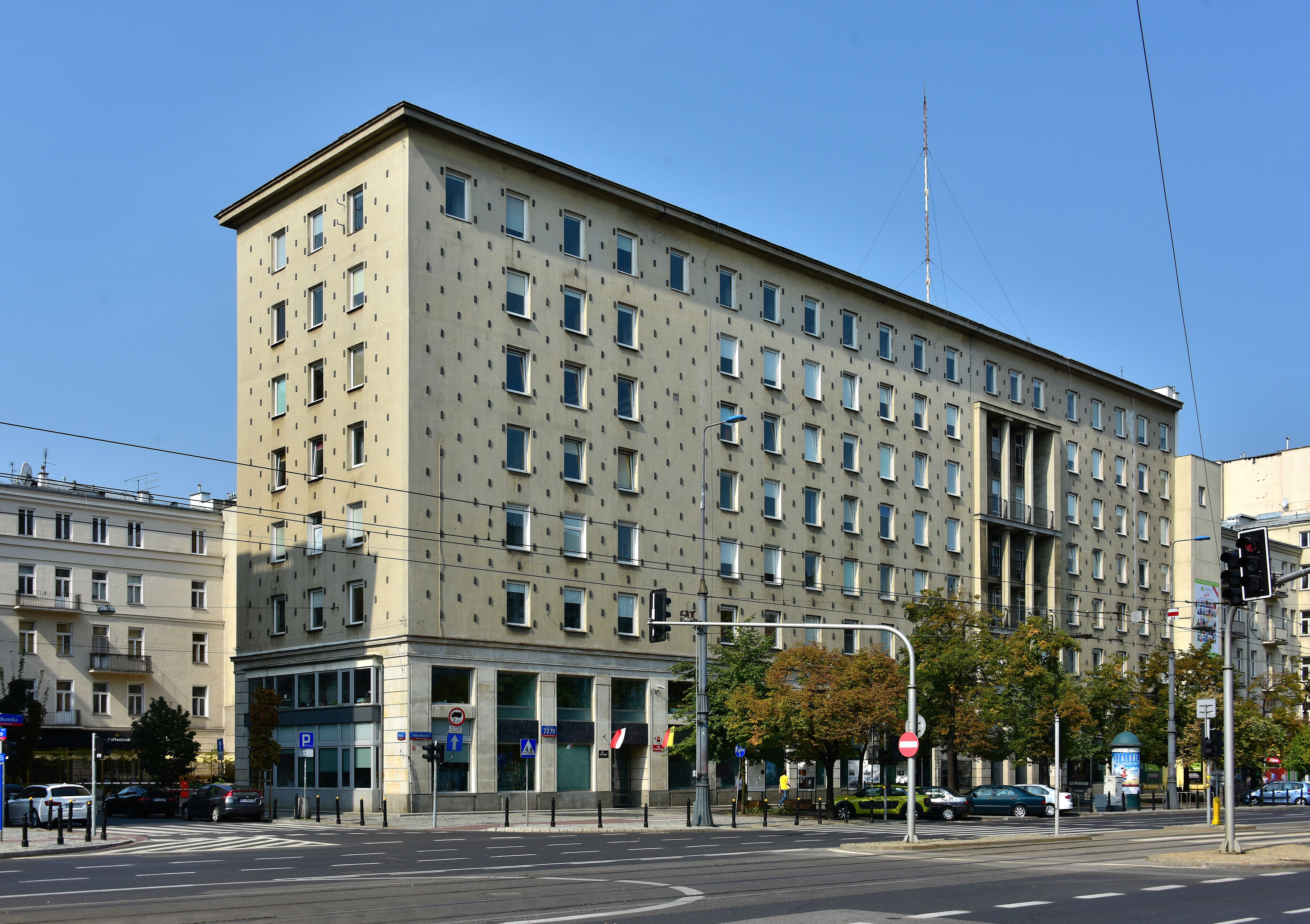 Ulica Marszałkowska 77 w Warszawie